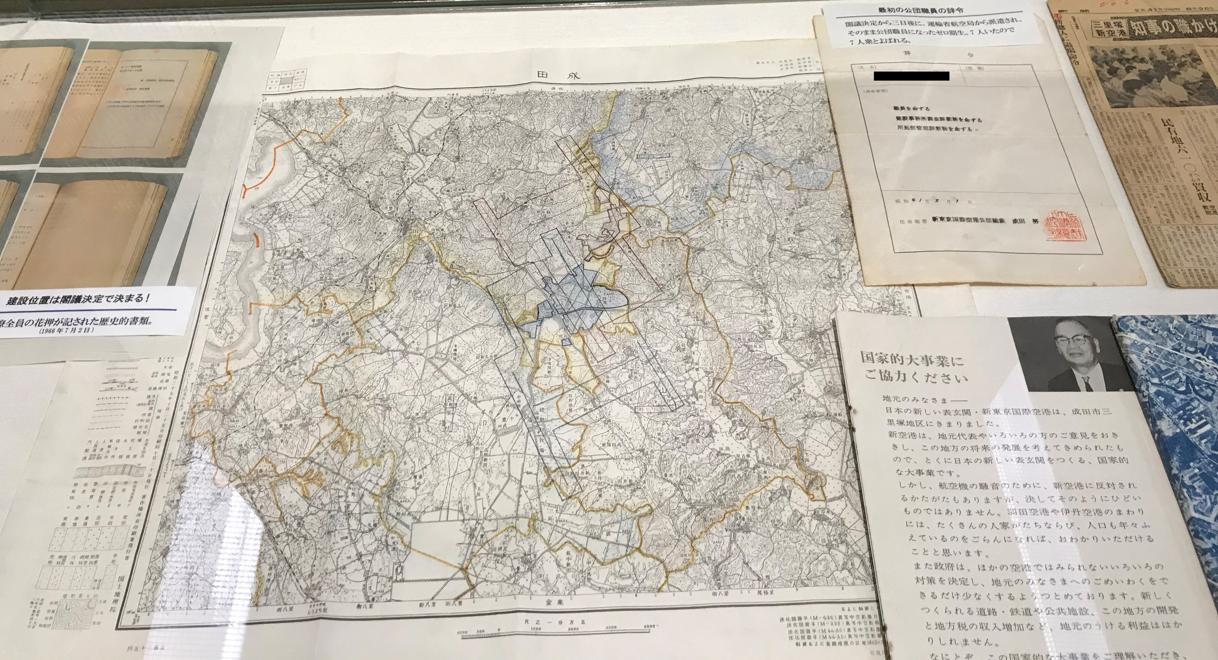 三里塚での空港位置を検討した時の図面の一つ。空港レイアウトは富里空港案のものが使われており、実際の成田空港の基本計画とは異なる（「成田空港 空と大地の歴史館」所蔵）